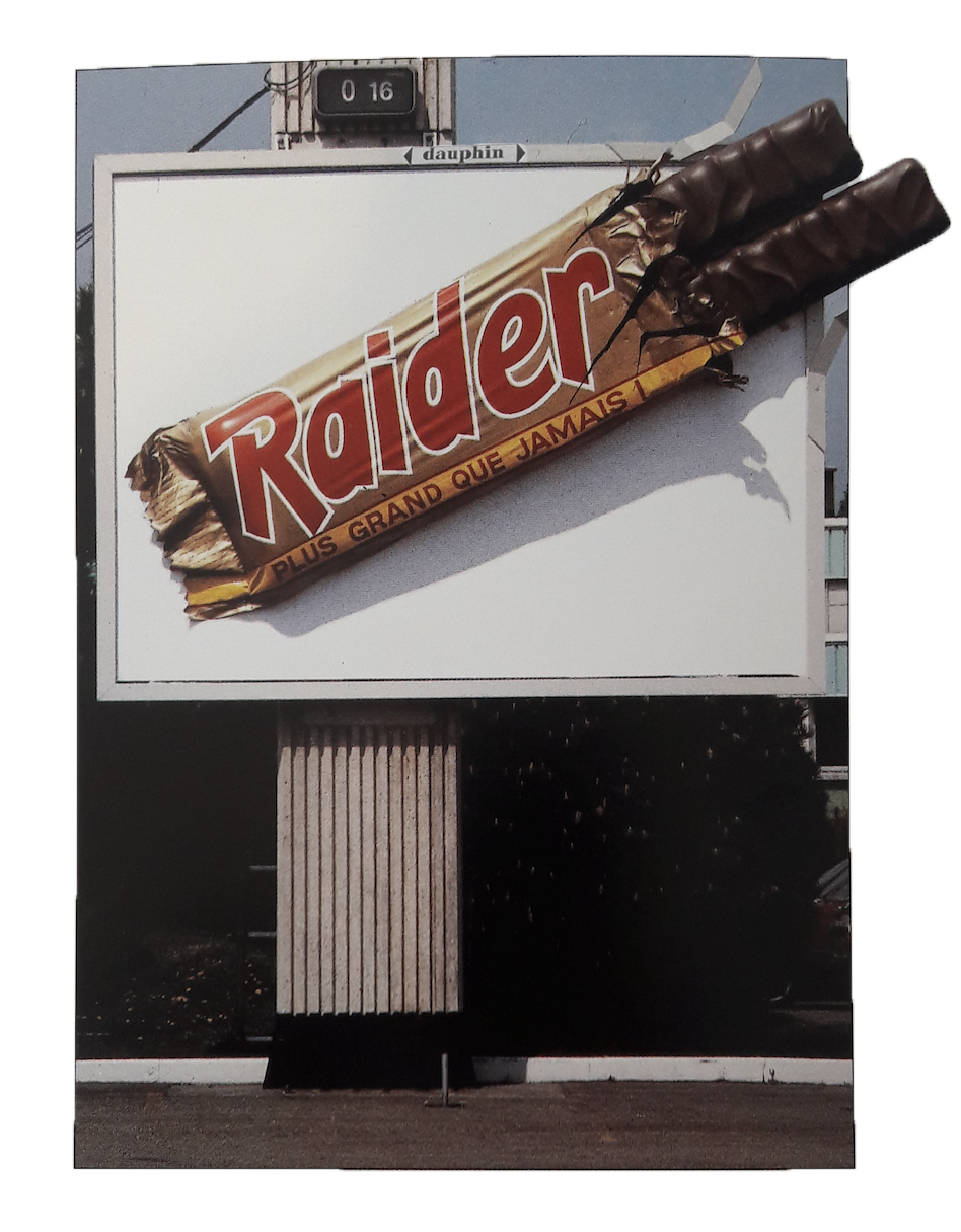 Dauphin Affichage panneau relief